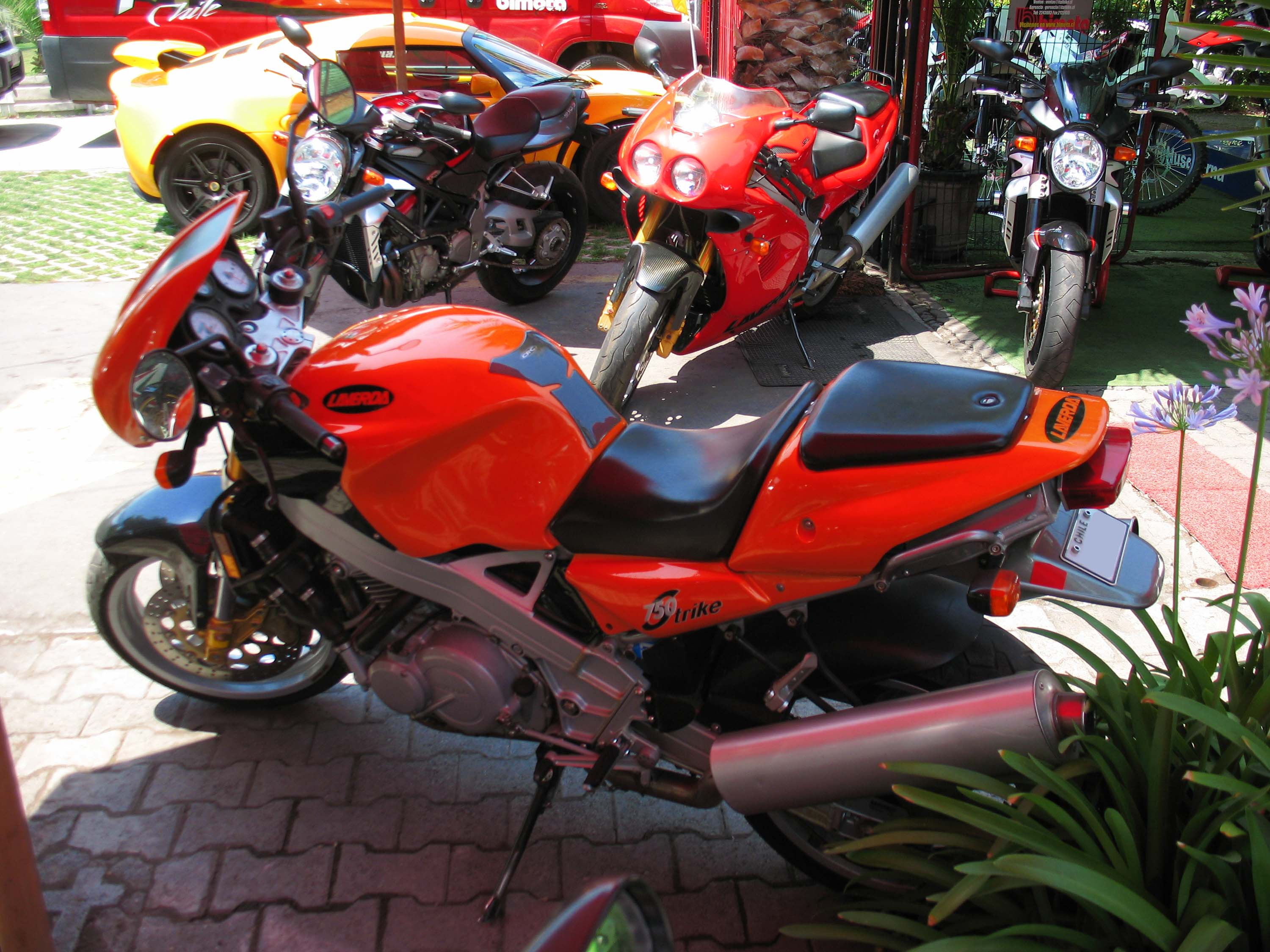 Laverda 750 strike 07